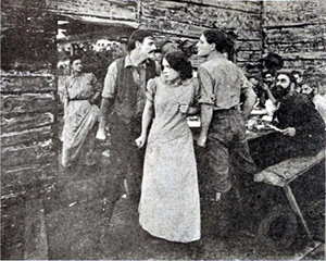 Gene Gauntier (center) and Jack J. Clark (right)